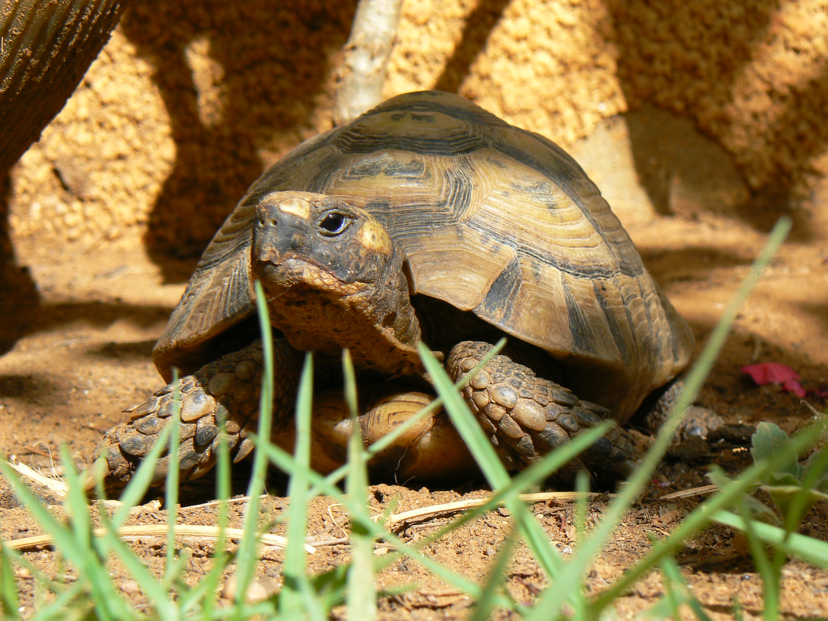 Tortue d'Afrique du Nord (Algérie) : testudo graeca.